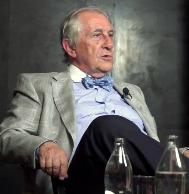 Entrevista a Inocencio Arias en lacaffe video magazine